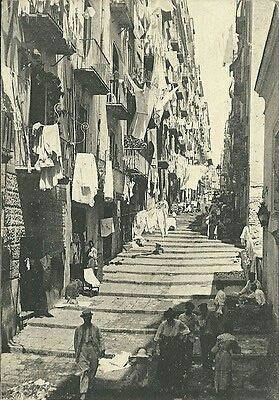 Napoli, Pallonetto di Santa Lucia. Autore sconosciuto.